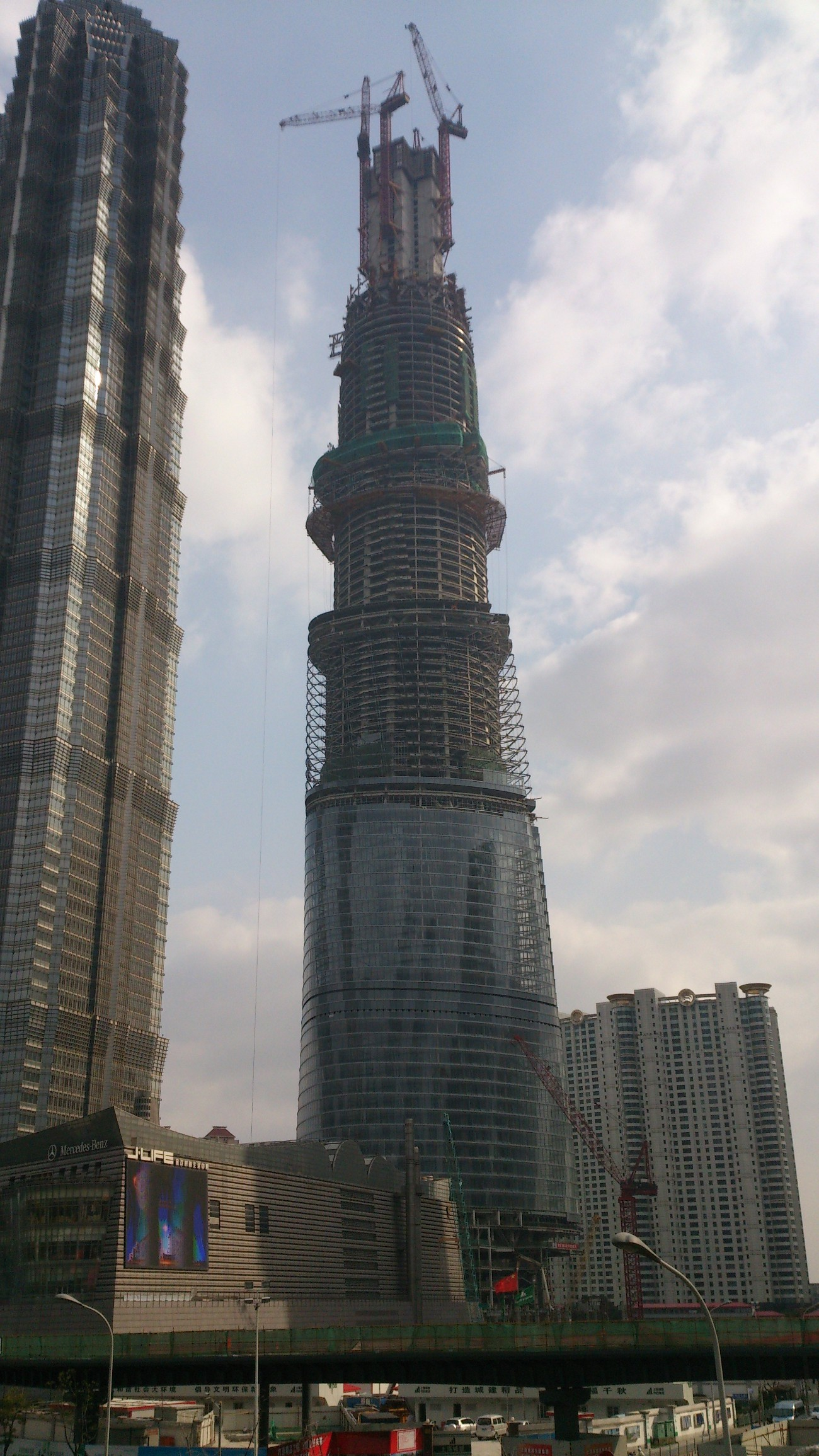 La Shanghai Tower en construction (mars 2013).